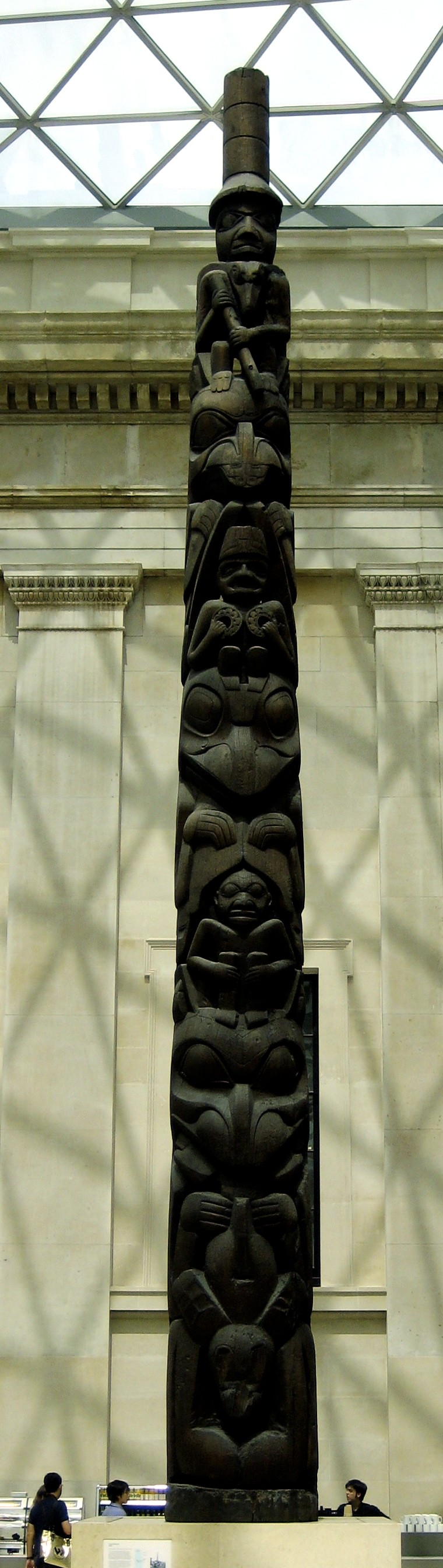 Totem pole made by Haida